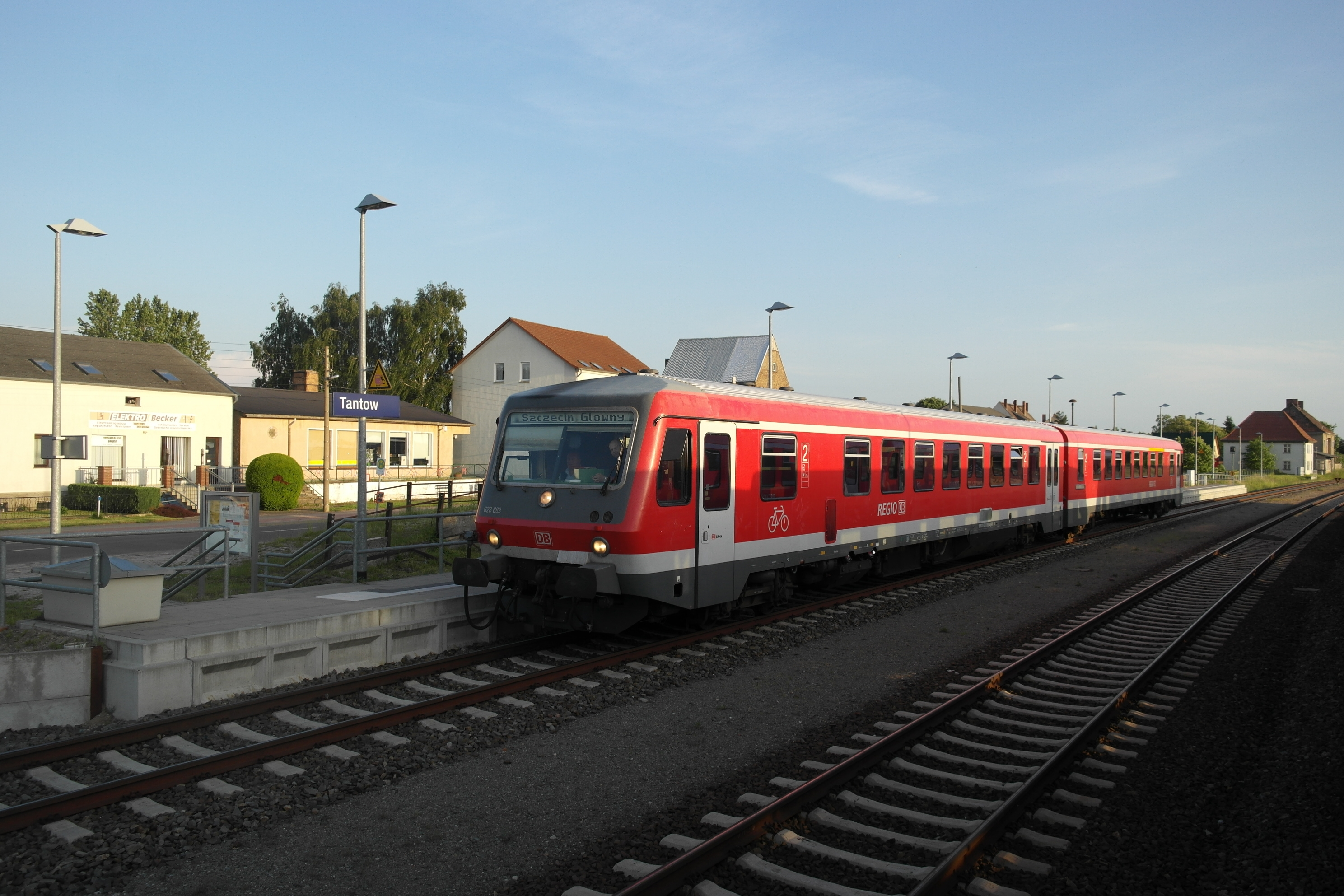 Bahnhof Tantow